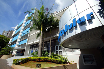 Fachada da Sercomtel Celular em Londrina, Paraná